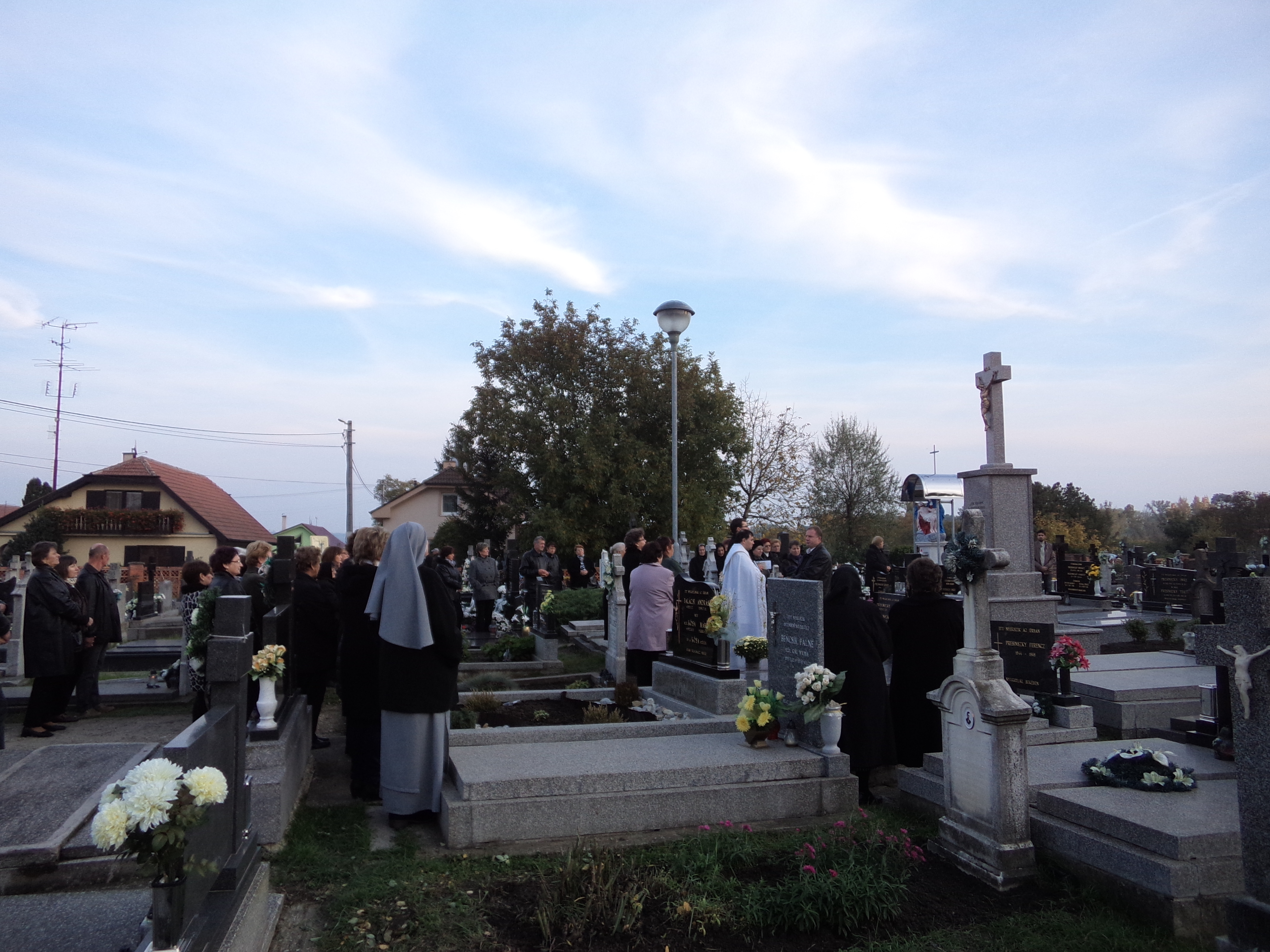 a nagycétényi öreg temető új keresztjének felszentelése 2015. október 25-én